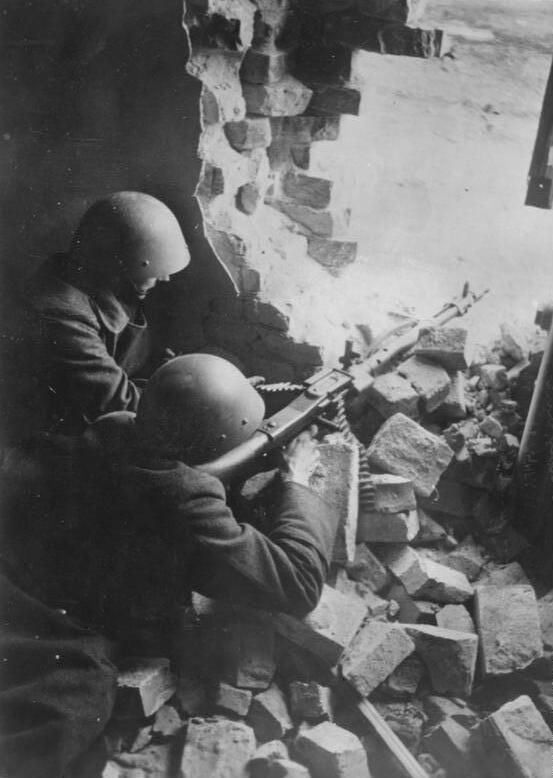 ADN-ZB/Archiv II. Weltkrieg 1939-45 An der deutsch-sowjetischen Front, Anfang April 1945: Zwei Volkssturmmänner mit einem MG in Stellung während der Kämpfe in Schlesien (Tritschler) [Scherl Bilderdienst]